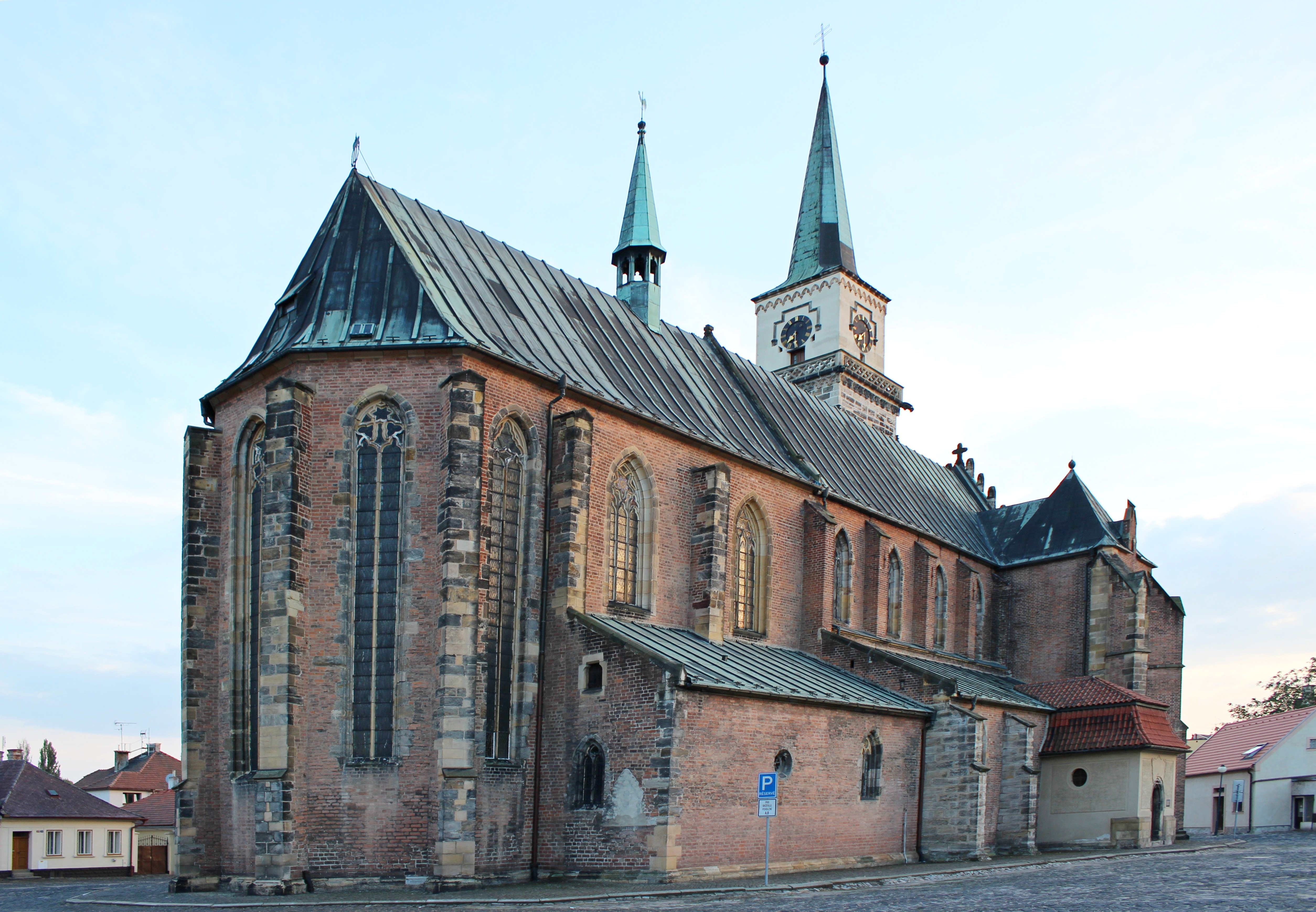 Pohled na kostel svatého Jiljí v Nymburce (pohled od severozápadu).